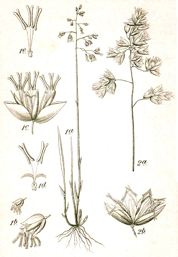 1. Anthoxanthum nitens (G.H.Weber) Y.Schouten & Veldkamp, syn. Hierochloe odorata (L.) P.Beauv. 2. Hierochloe australis (Schrad.) Roem. & Schult. Original Caption 1. Mariengras, Hierochloa odorata Wahlnbg. 2. Darrgras, H. australis R. u. Sch.